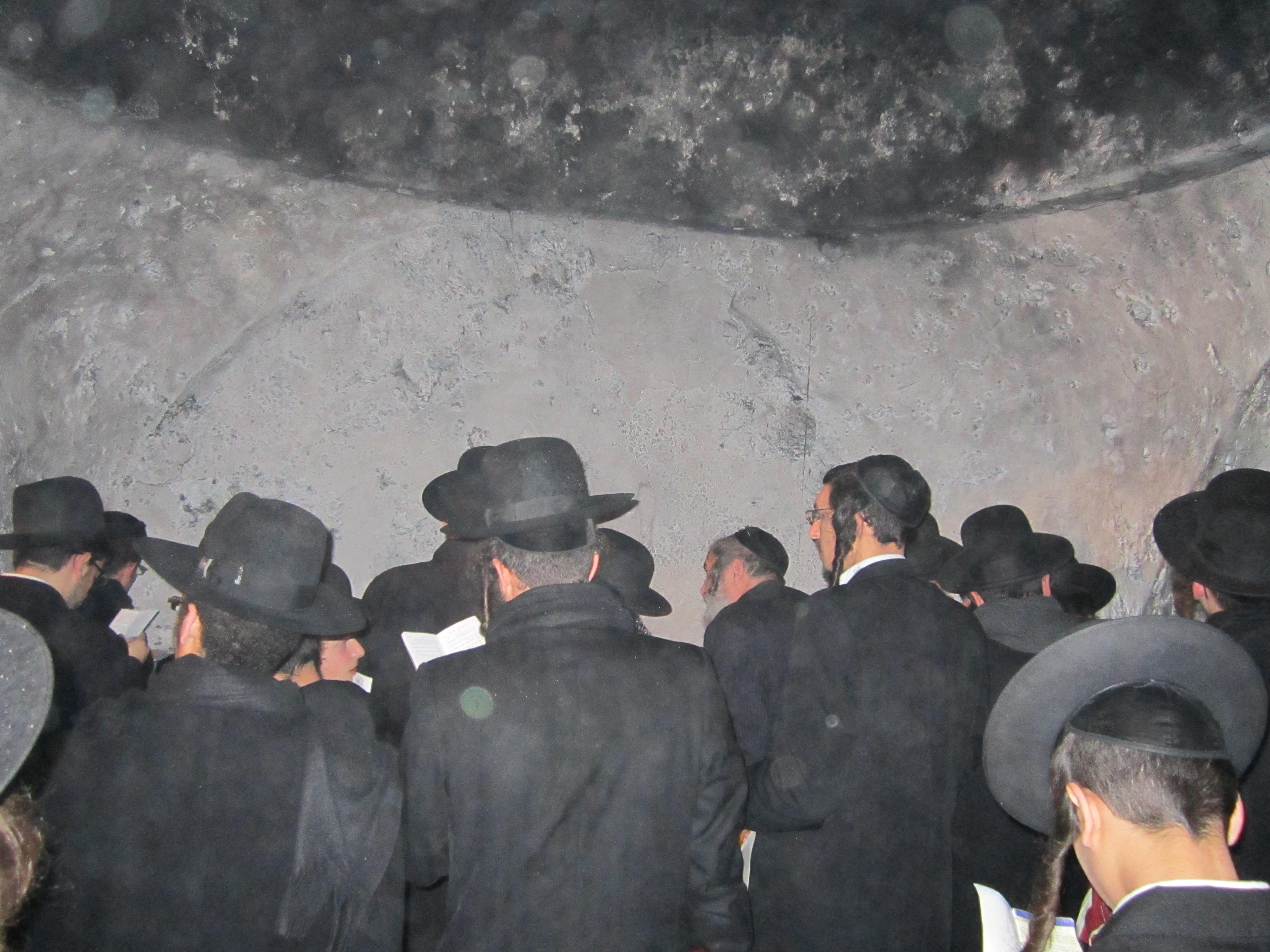 מתפללים בקברי שבעים הזקנים גבעת פנחס (עוורתא)